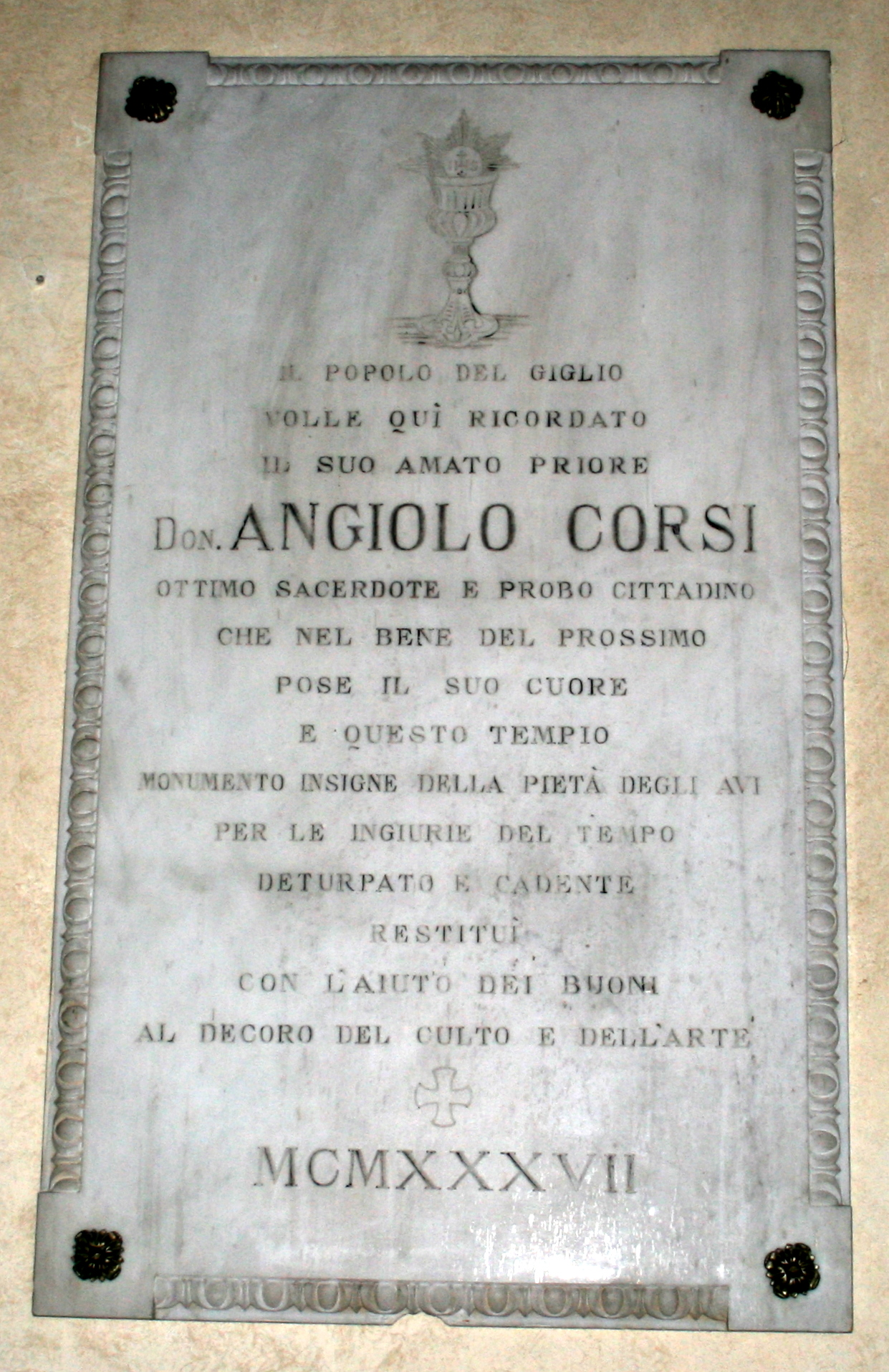 Lapide